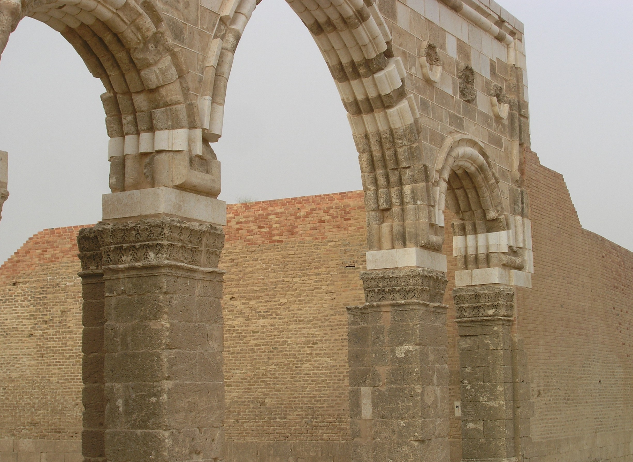 Mshatta - umayyadisches Wüstenschloss in Jordanien. Front mit aufgerichtetem Tor, Detail.